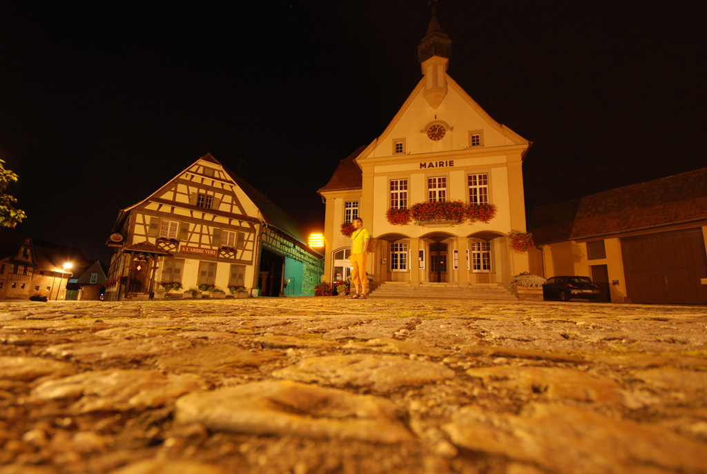 Small village in Alsace